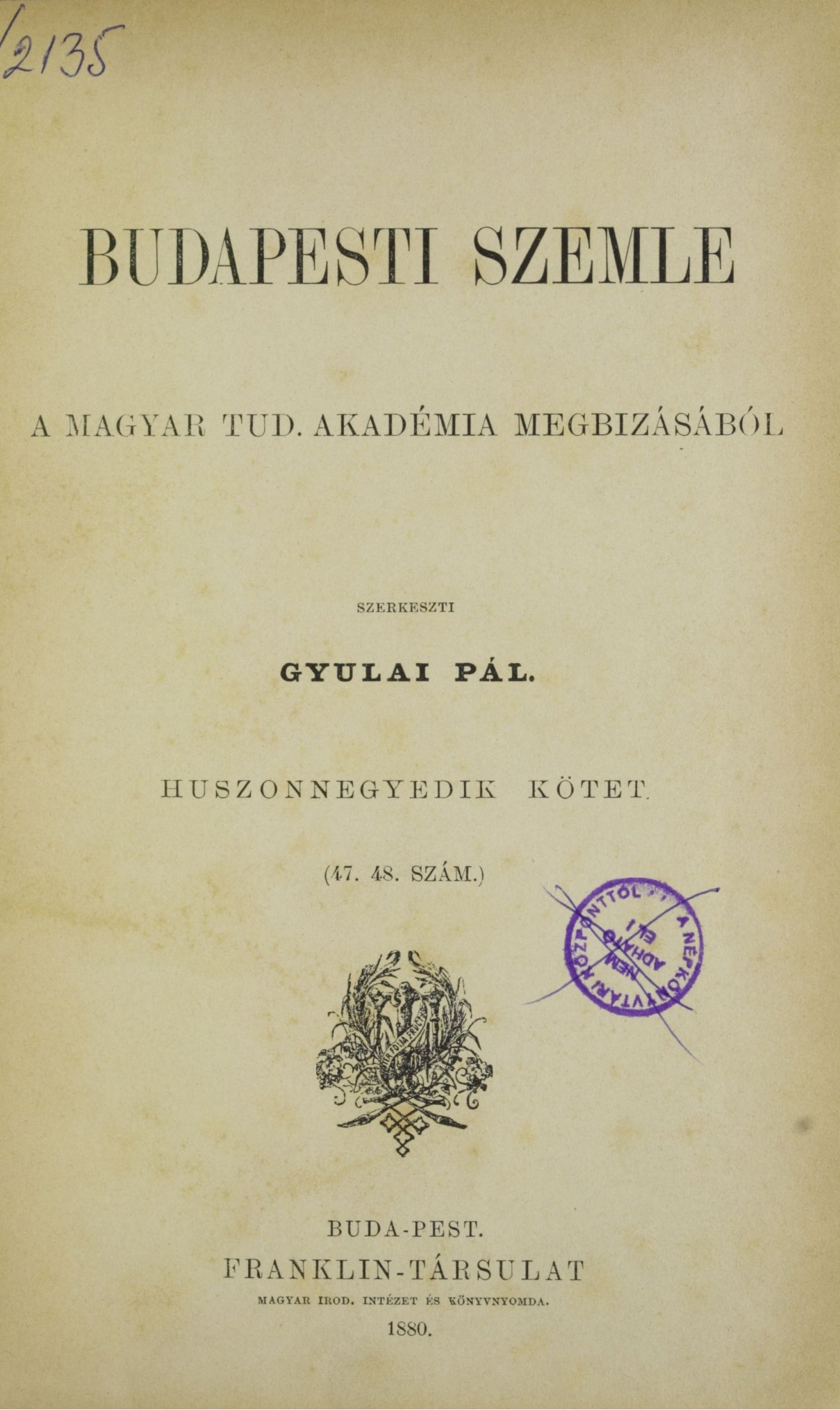 Budapesti Szemle címlapja